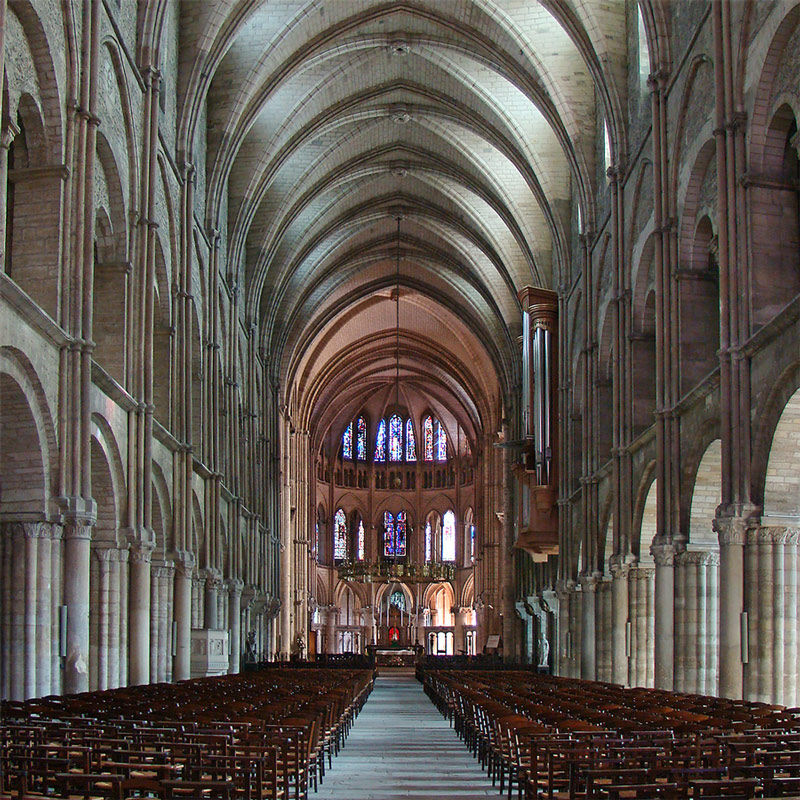 Basilique Saint-Remi, Reims, Champagne-Ardenne, France.